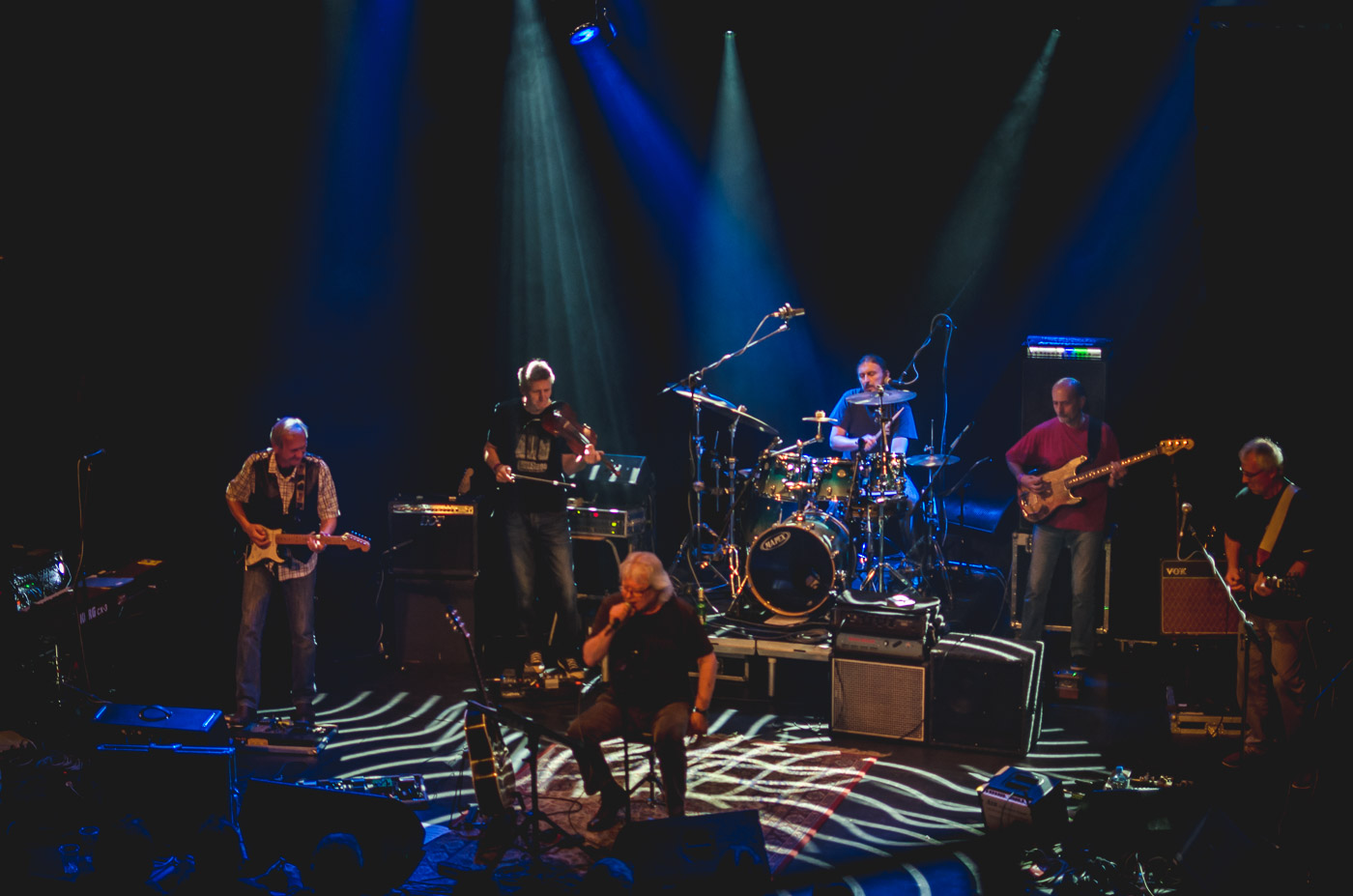 Koncert Vladimíra Mišíka s kapelou Etc... v Paláci Akropolis 19.10.2015